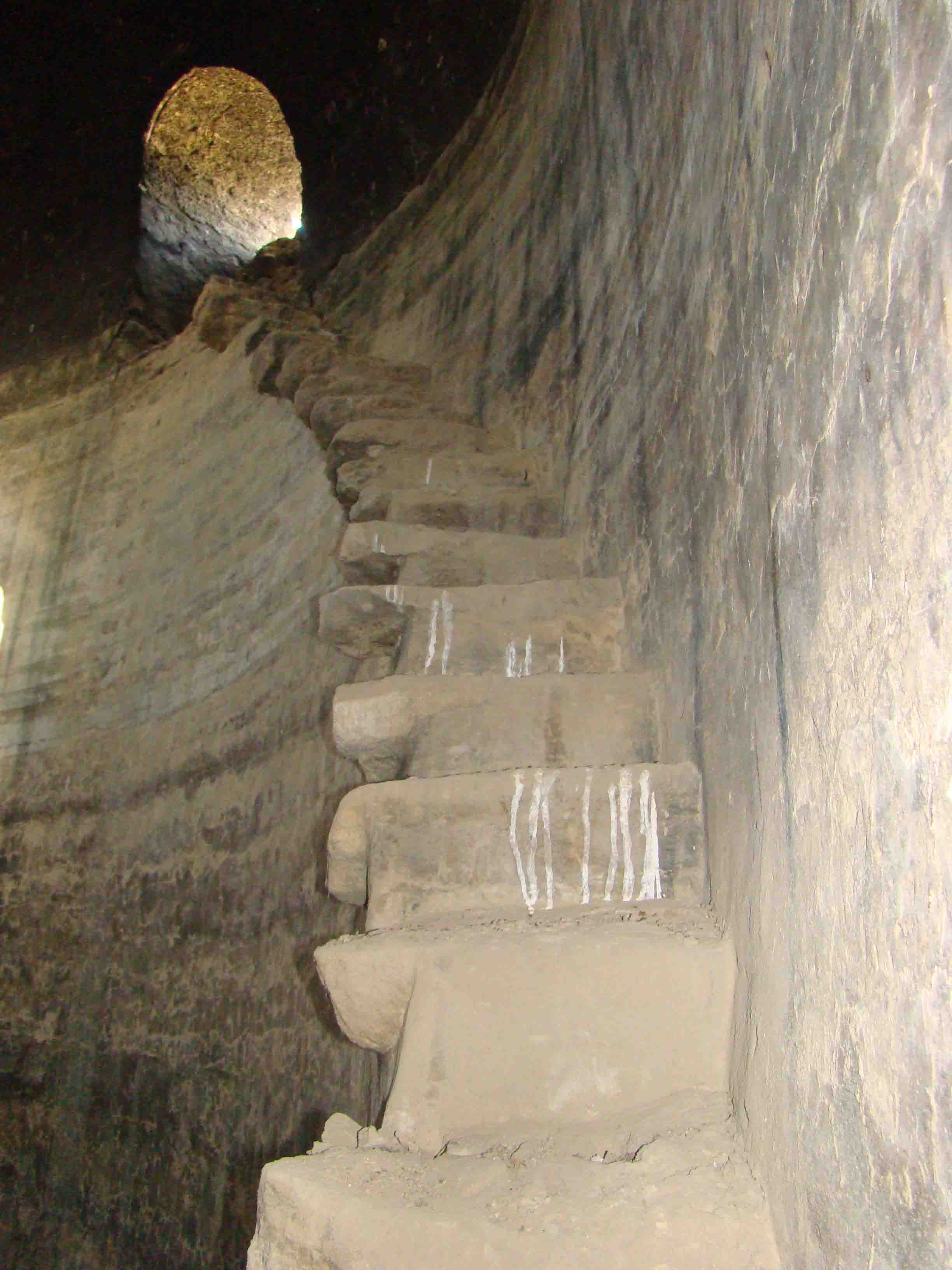 آب انبار قطب آباد جویم نمای داخلی-راه پله ها